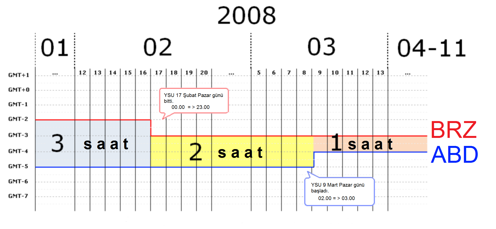 Time-differences-brz-us.png adlı dosyanın türkçeleştirilmiş halidir.